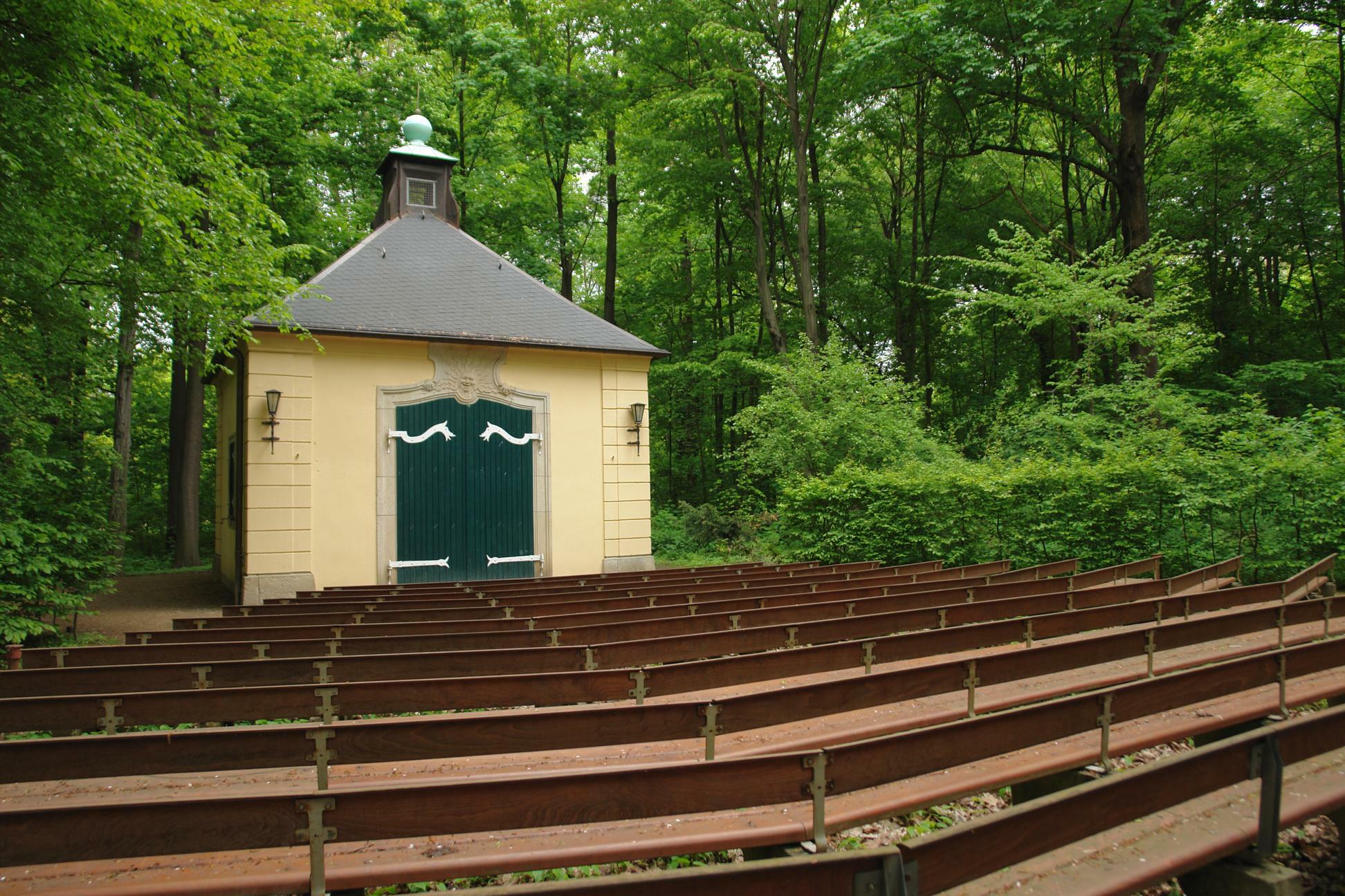 Ansicht des Puppentheaters „Sonnenhäusel“ im Dresdner Großen Garten vom Zuschauerraum aus